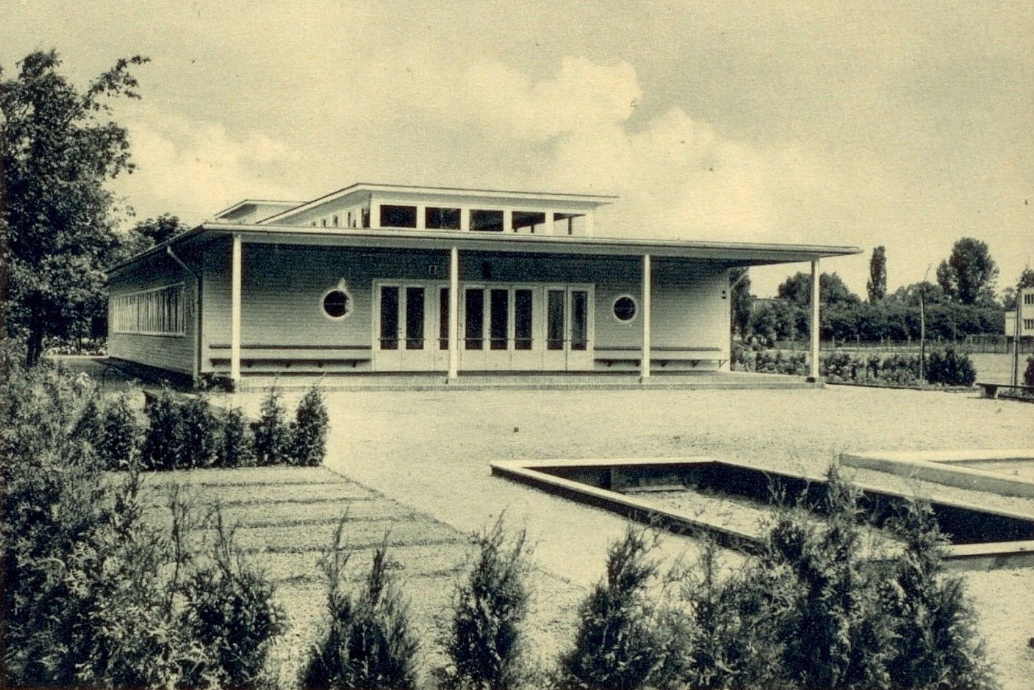 Przedszkole na wystawie WuWA